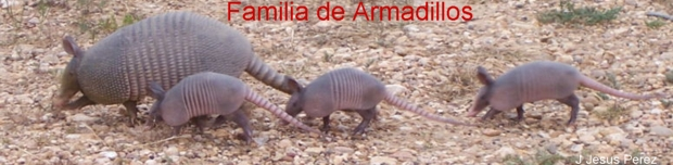 Los armadillos son animales de hábitos nocturnos, tienen una constitución robusta; se puede decír que casi el 100% de su piel es una especie de armadura, protegida a su vez por una caparazón aun mas dura dentro de la cual repliega sus extremidades cuando su vida corre un peligro fatal